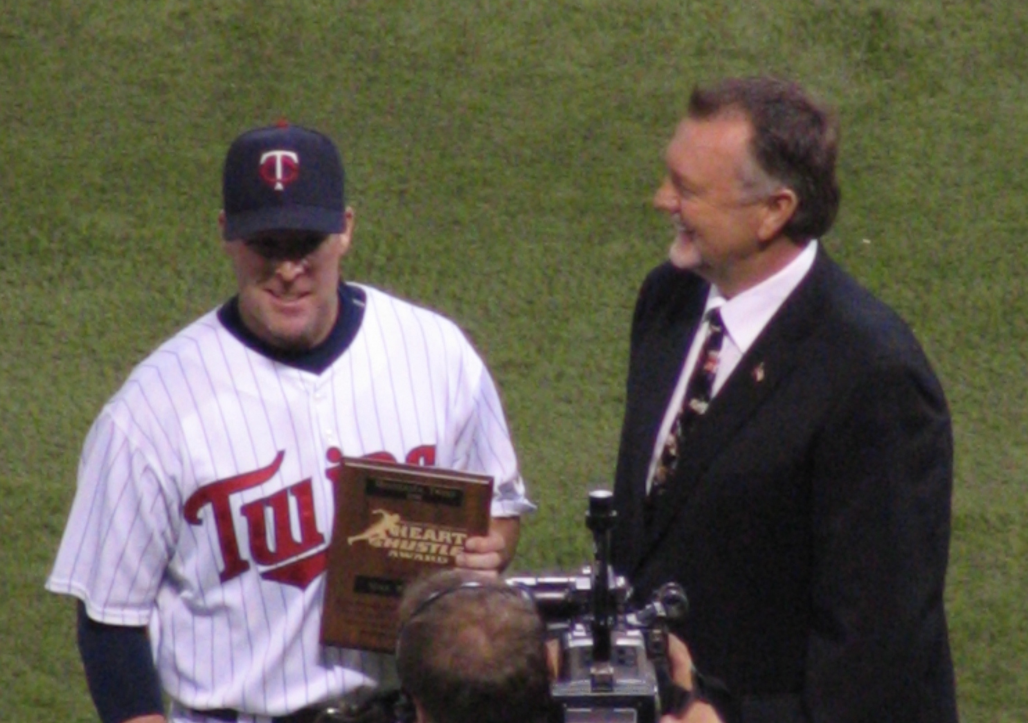 Mike Redmond (left) and Bert Blyleven in 2008